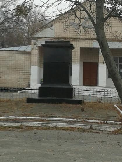 Памятник Ленину село Вильск